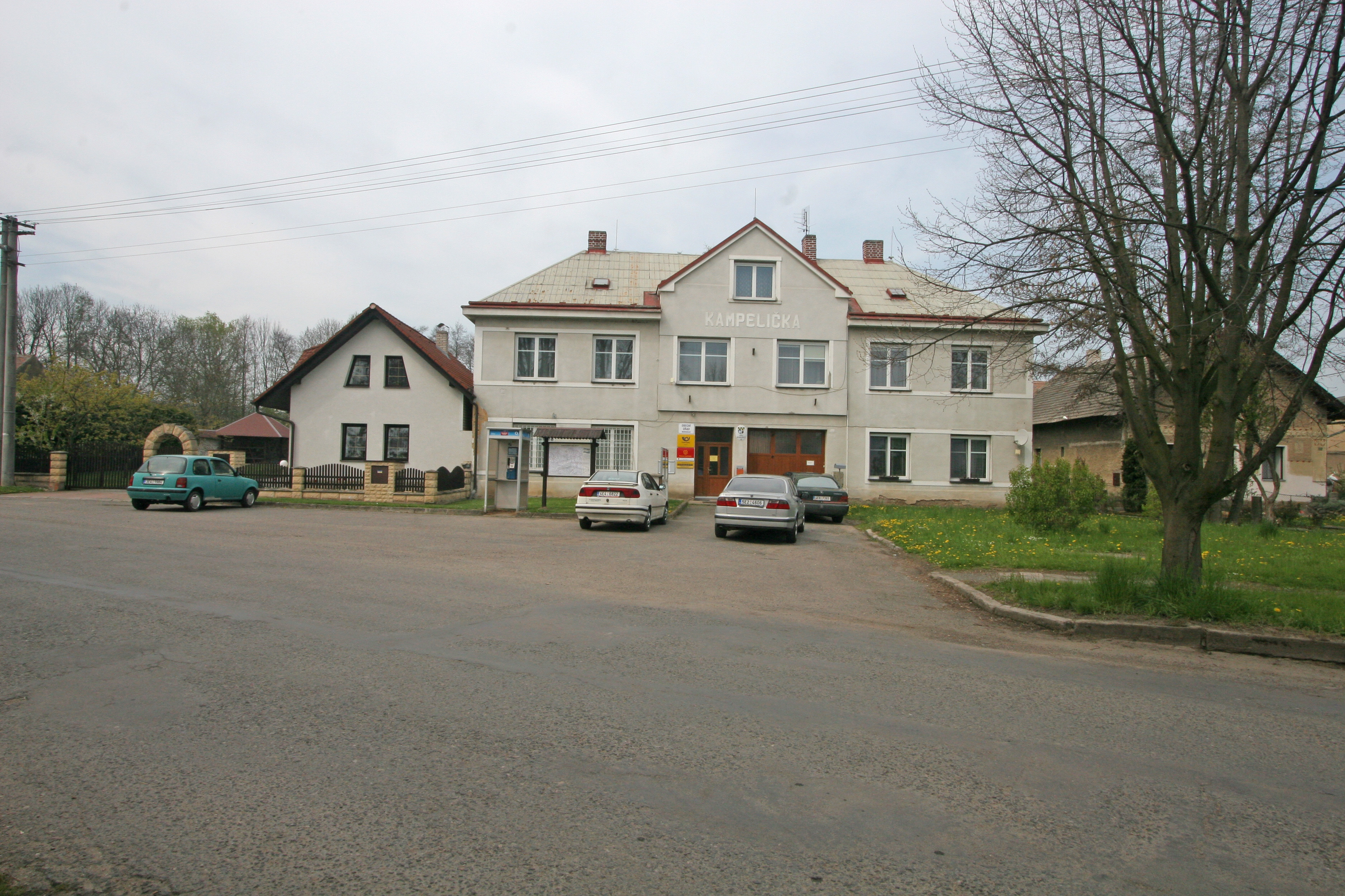 Morašice obecní úřad